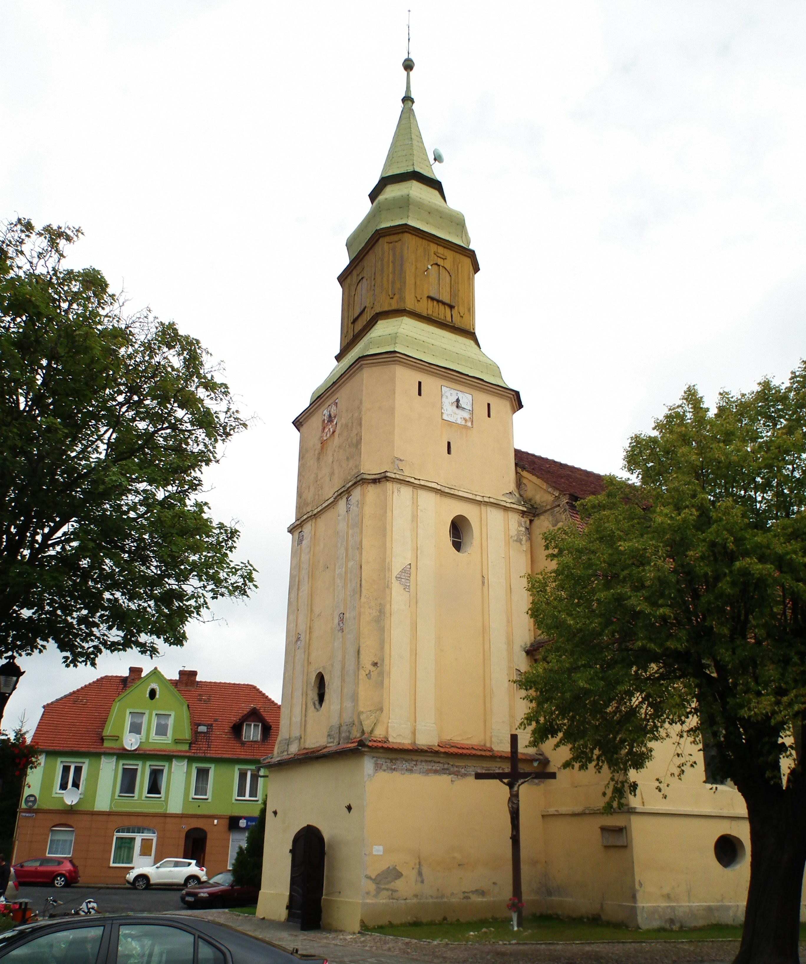 Rynek w Jasieniu.